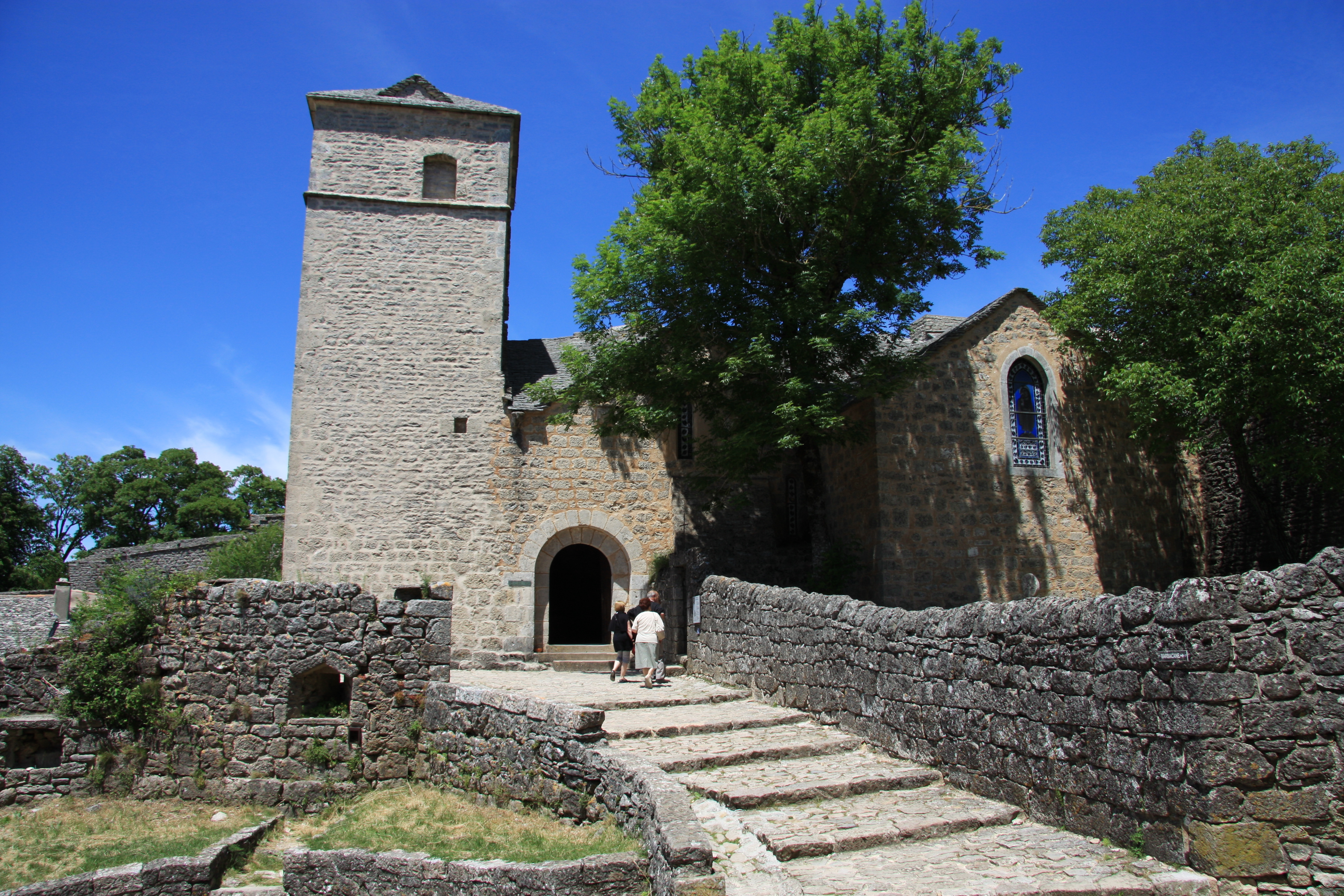 L'église Saint-Christophe à la Couvertoirade en Aveyron (France)